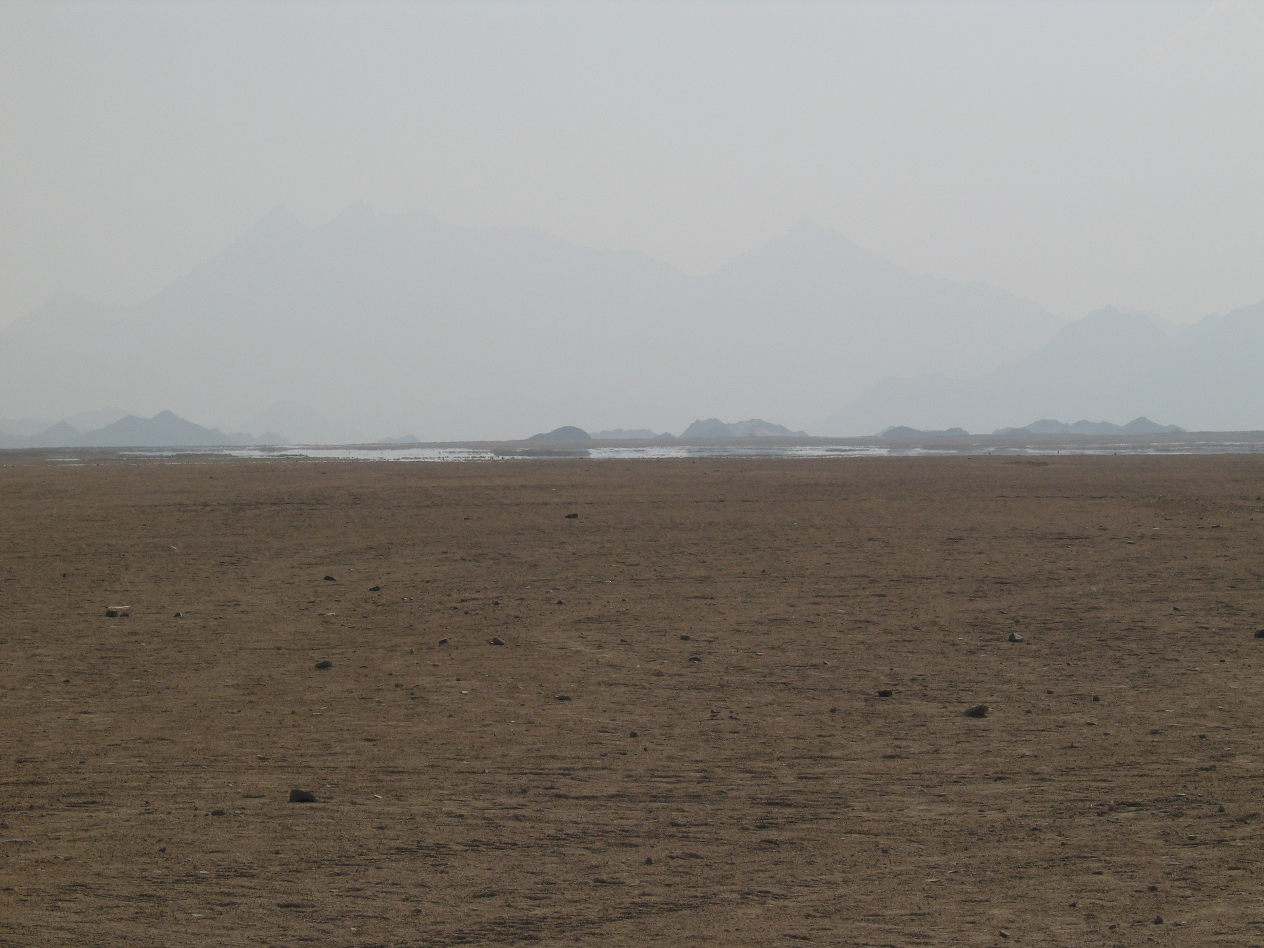 Мираж в Аравийской пустыне